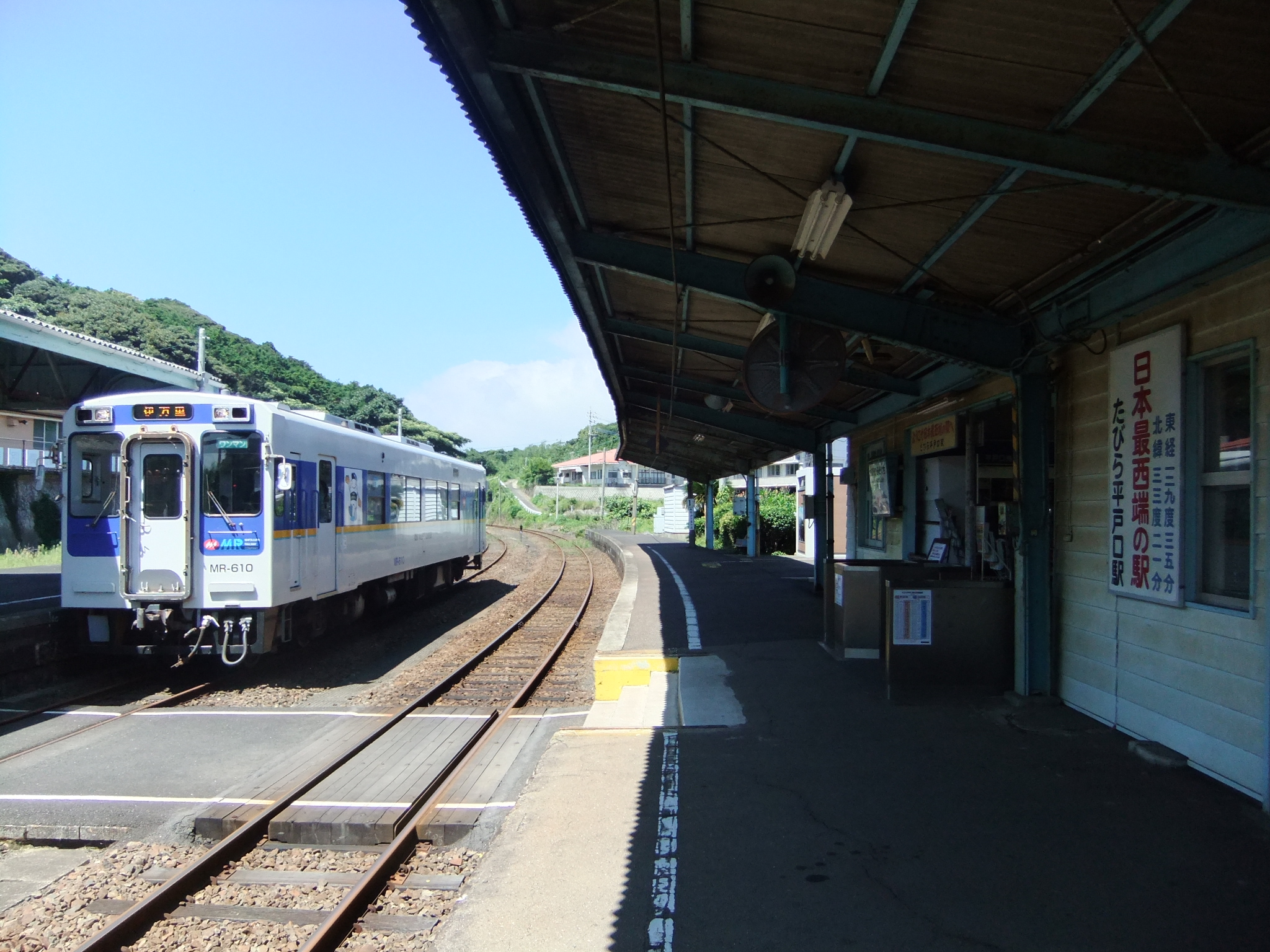 たびら平戸口駅 ホーム